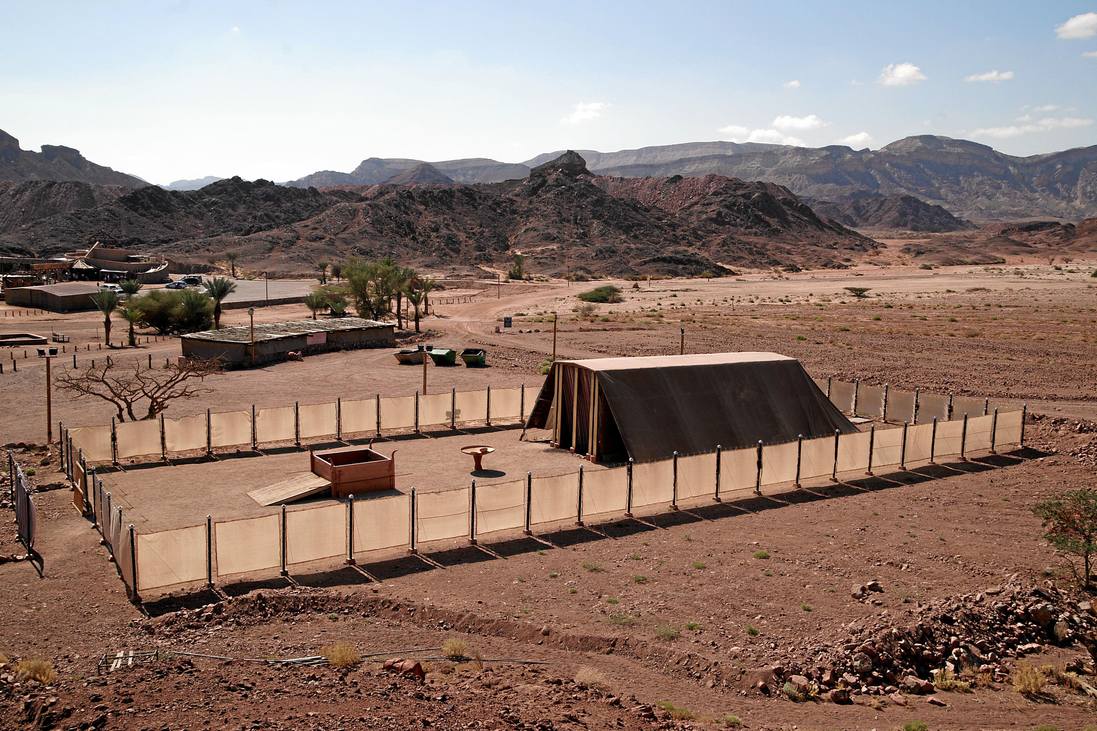 Timna: Stiftshütte